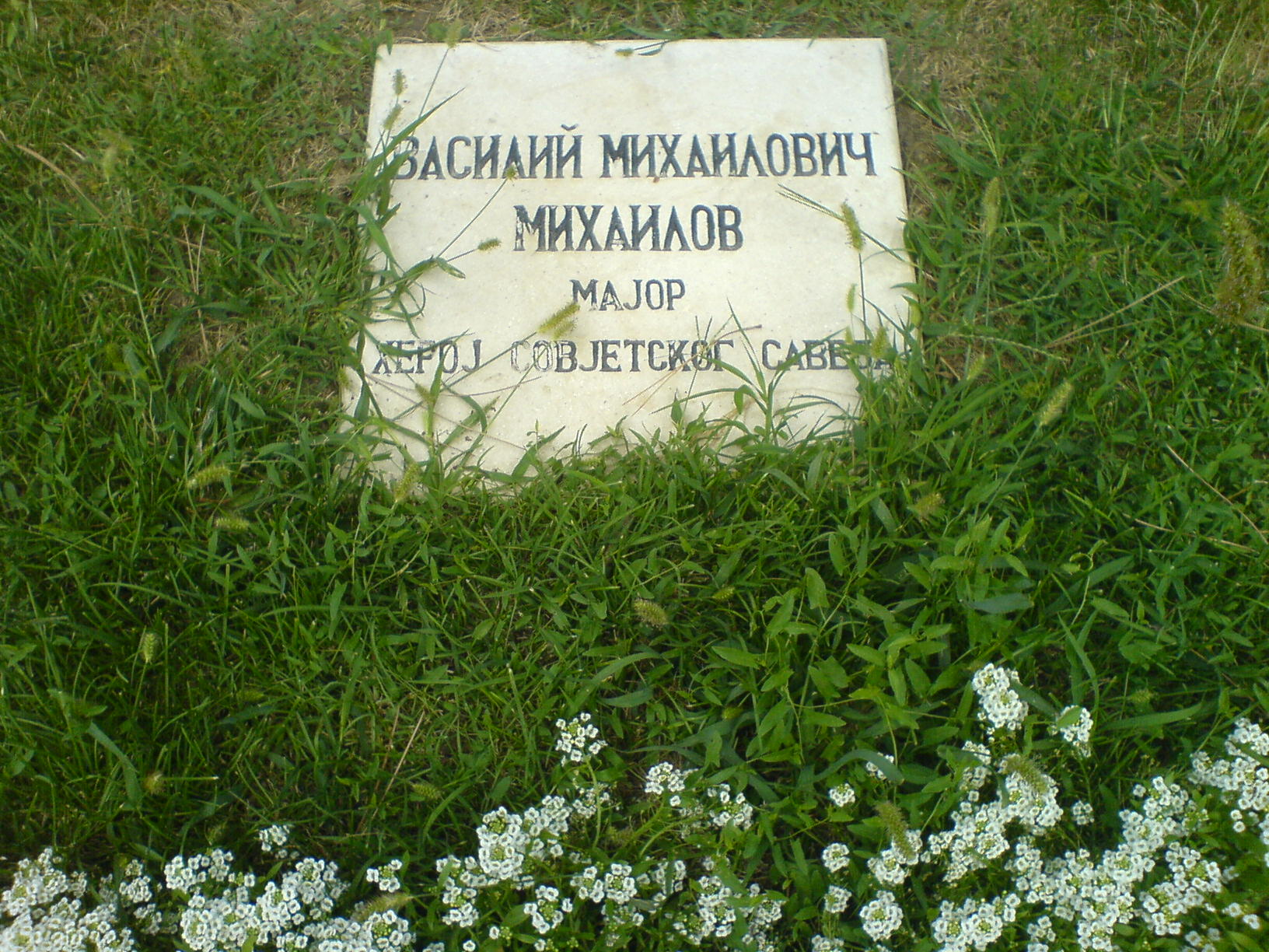 Grob Vasilia Mihailovica Mihailova